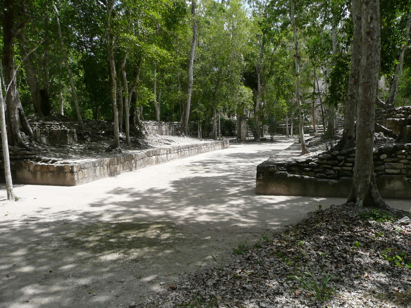 Zona arqueológica de Calakmul.